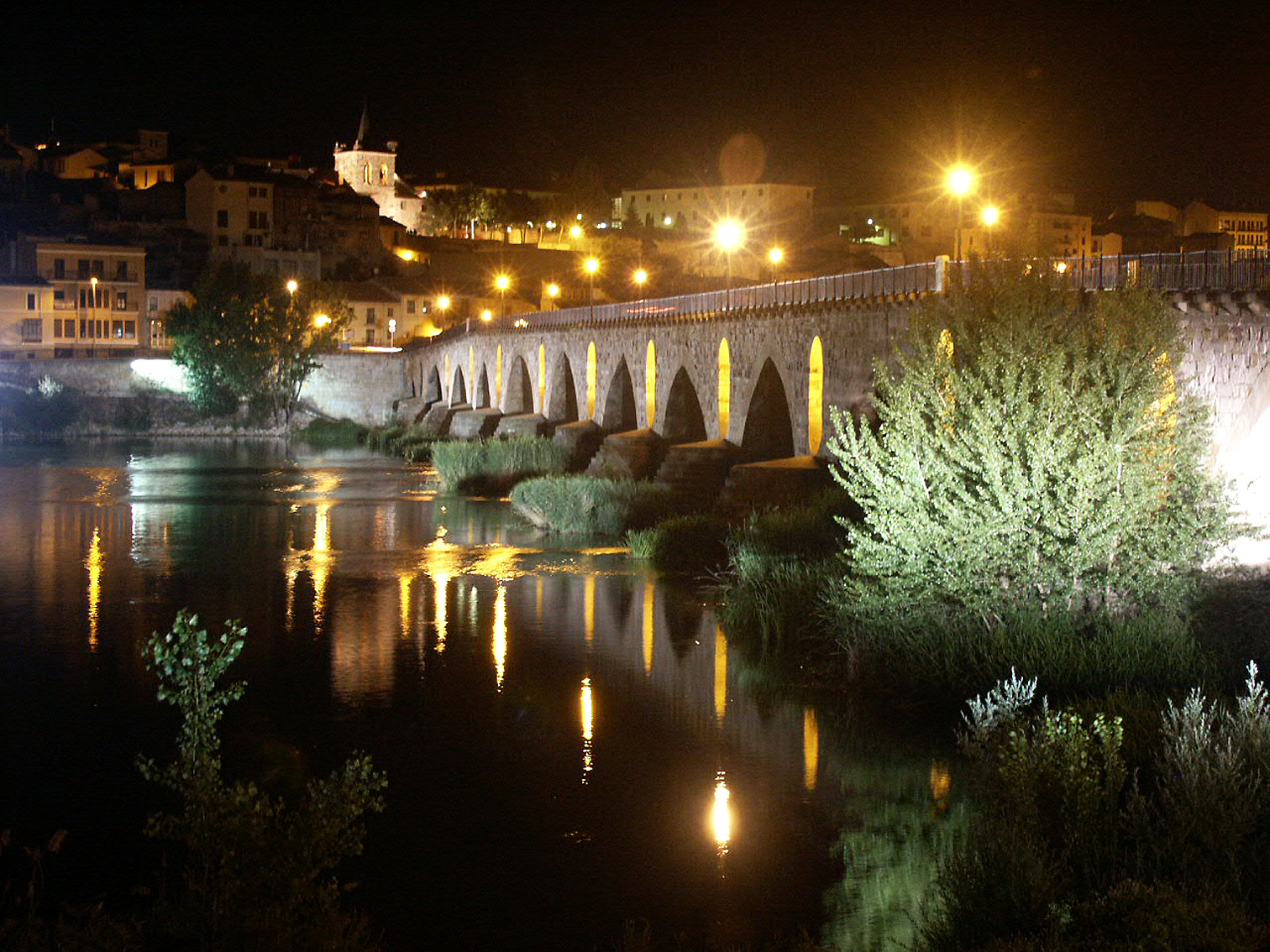 Detalle nocturno del puente romano de Zamora, España